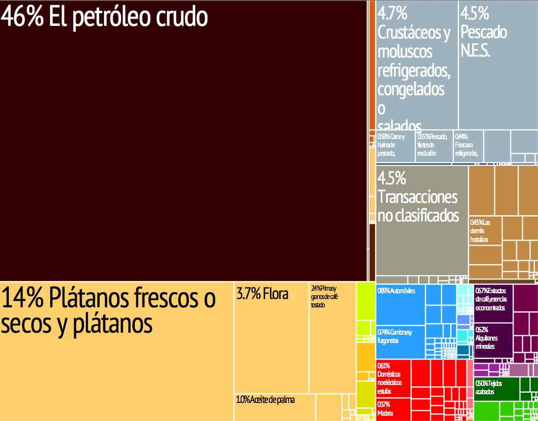 Representación gráfica de los productos de exportación del país en 28 categorías codificadas por color. Cada recuadro de color representa un producto y su tamaño es proporcional a la participación que ese producto representa dentro del total de las exportaciones del país.